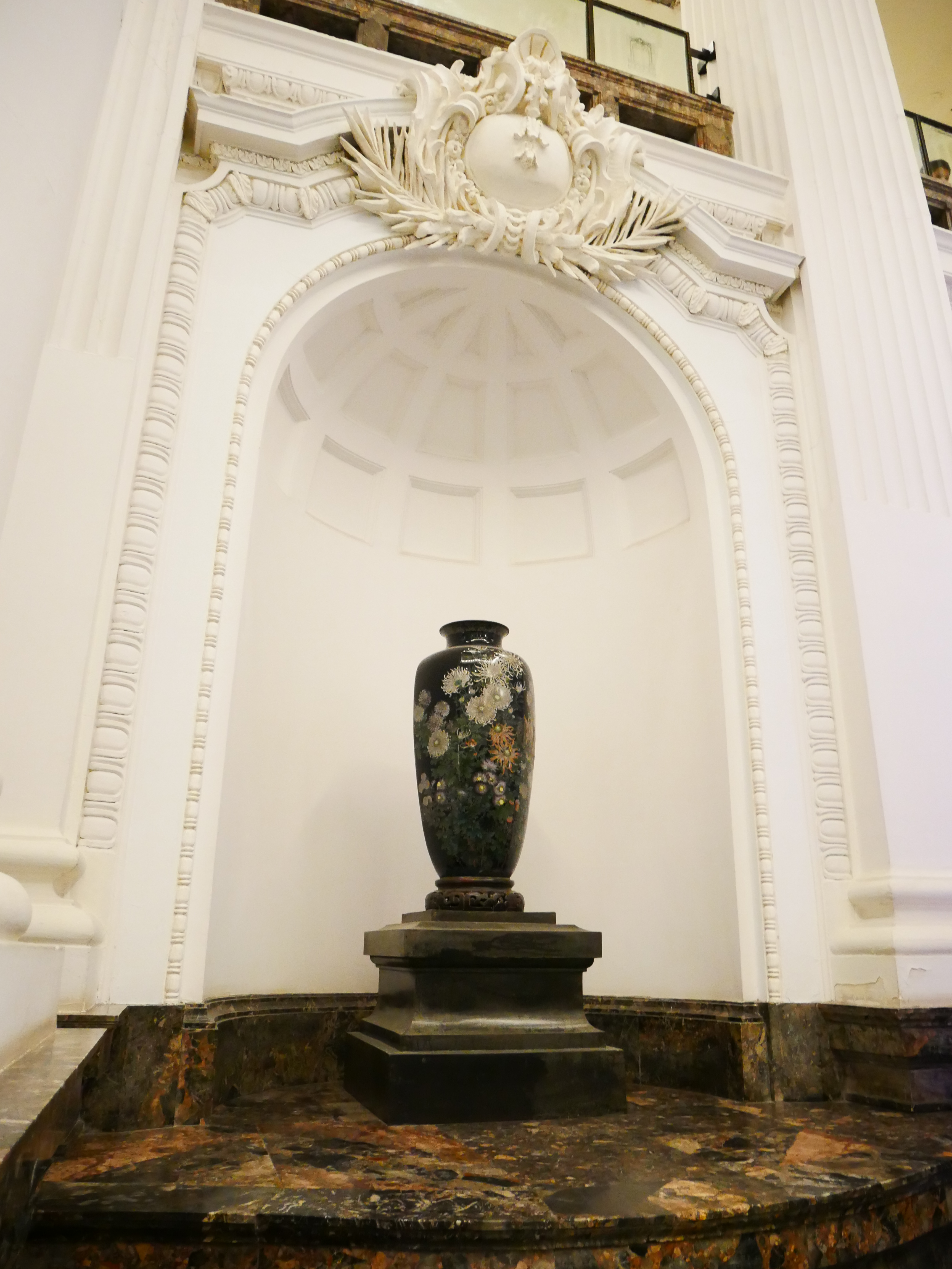 國立臺灣博物館大廳壁龕，臺北市中正區城內次分區黎明里